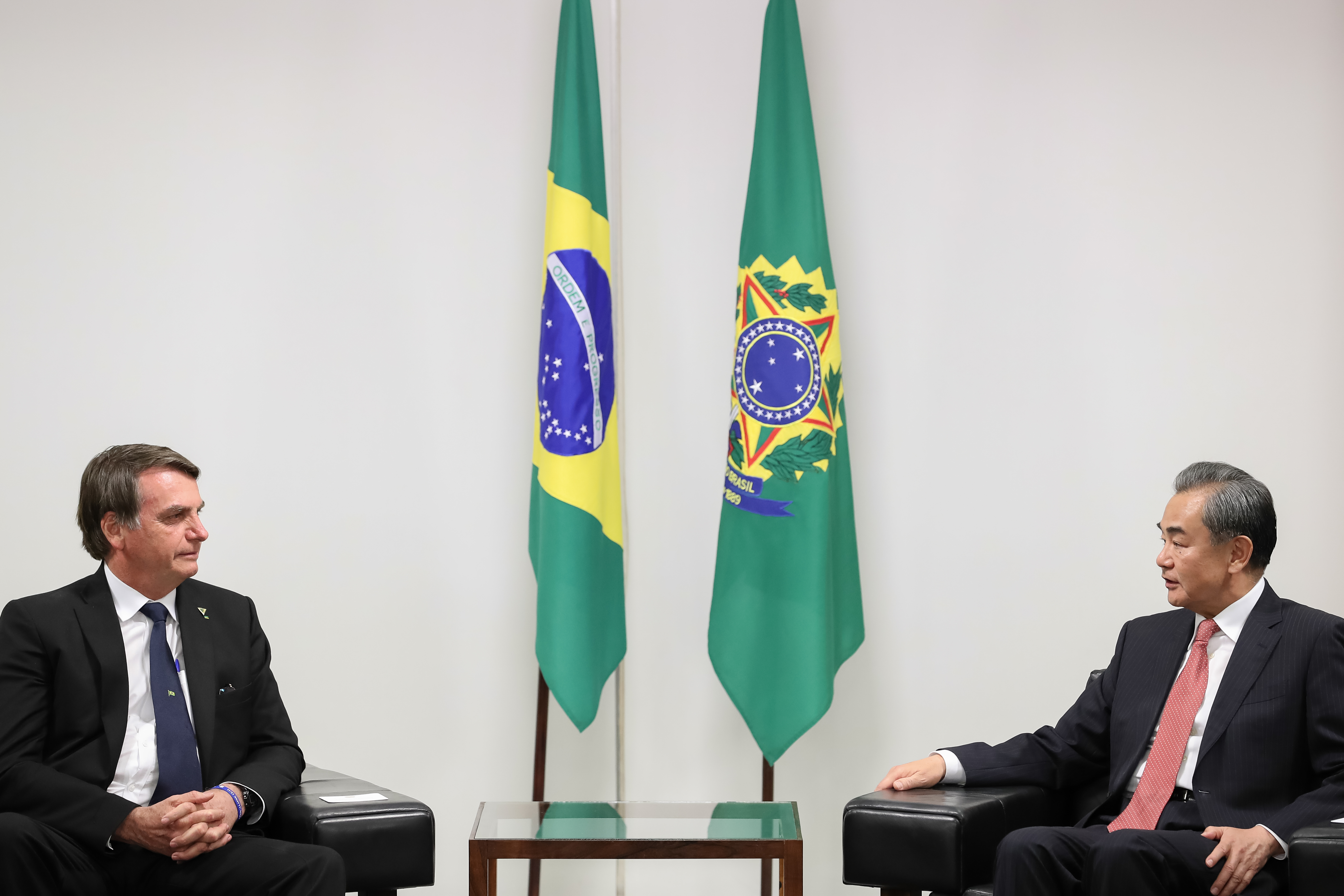 (Brasília -DF, 09/076/2019) Encontro com Conselheiro de Negócios da Embaixada da República Popular da China no Bras, Wang Yi.Foto: Marcos Corrêa/PR